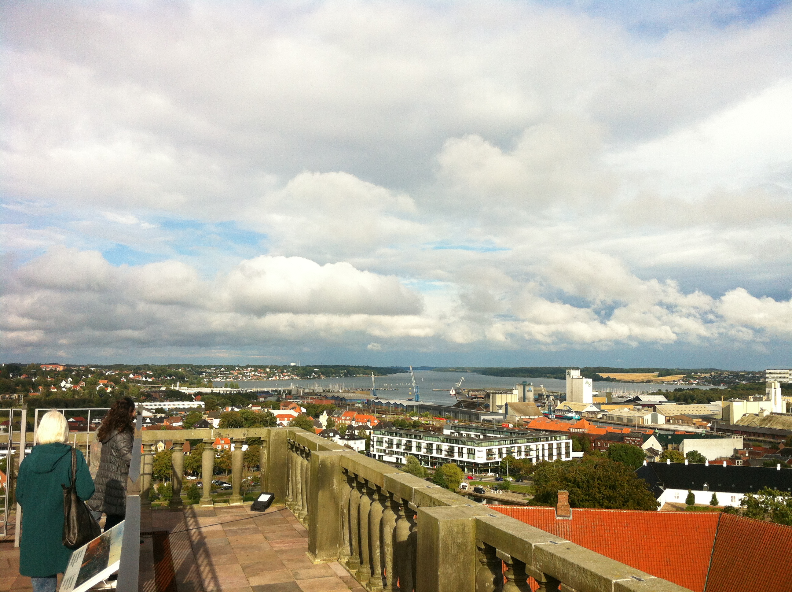 Udsigt fra Koldinghus, august 2014, blandt andet ses biblioteket, havnen, fjorden osv.